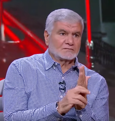 إكرامي أحمد الشحات حارس مرمى النادي الأهلي وممثل